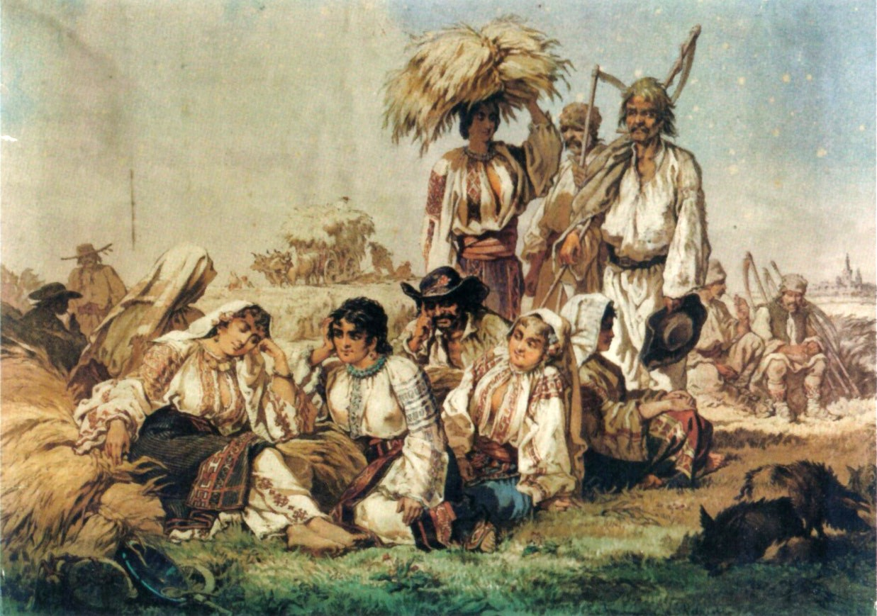 Secerătorii - cromolithografie - Biblioteca Academiei Române